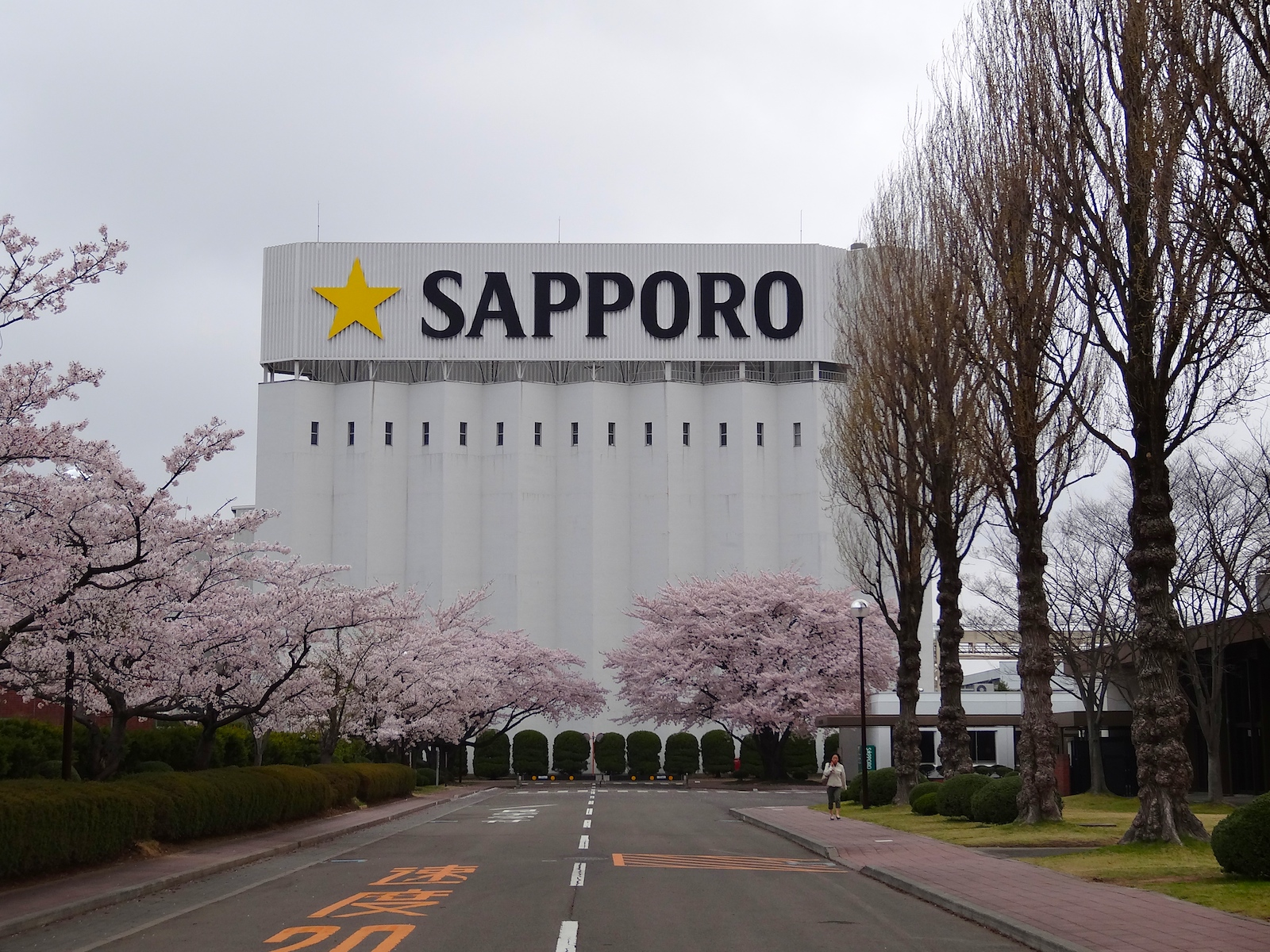 札幌ビール仙台工場（春）